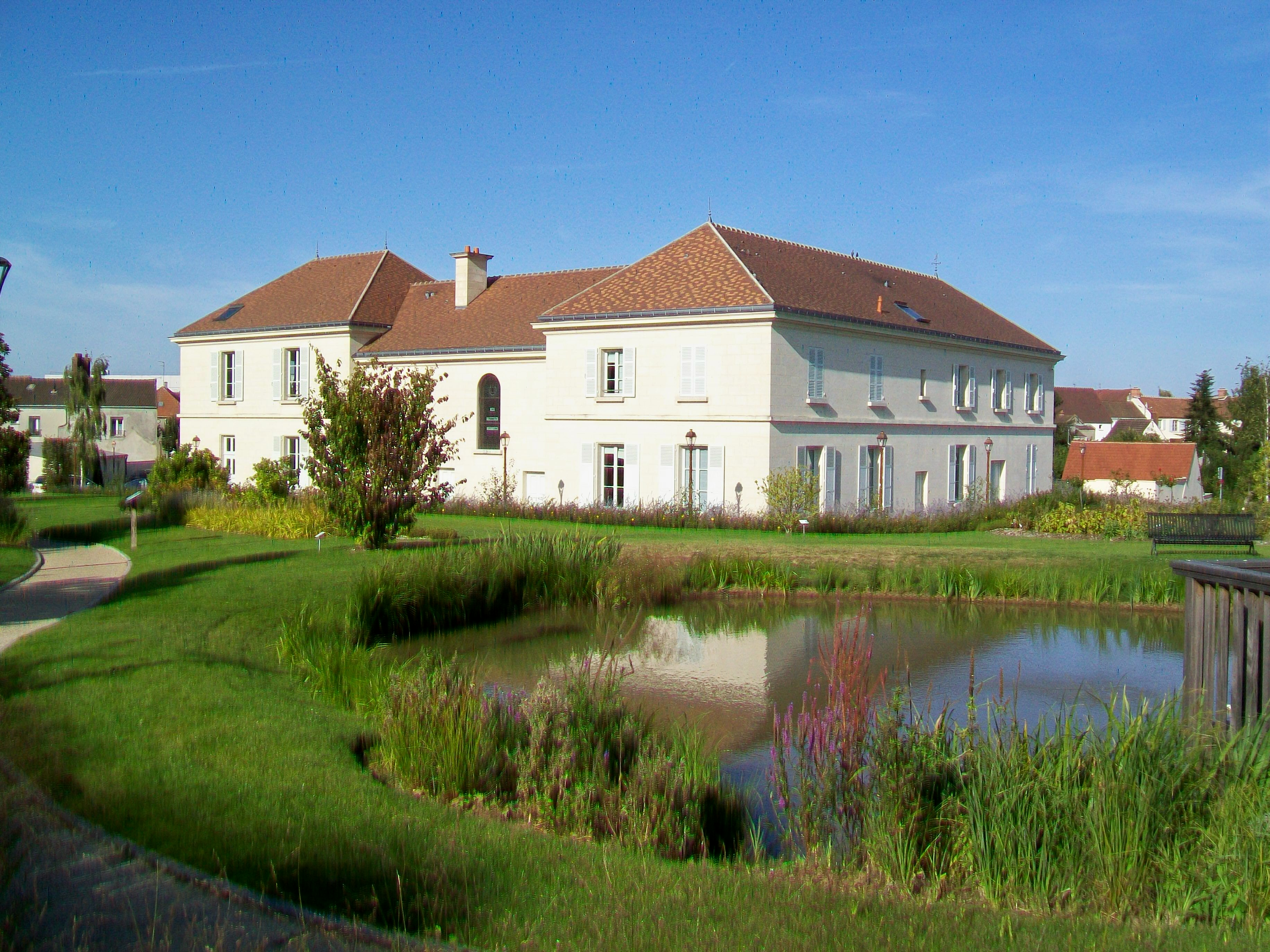 La nouvelle mairie et le parc paysager de la mairie, rue du Chapeau.